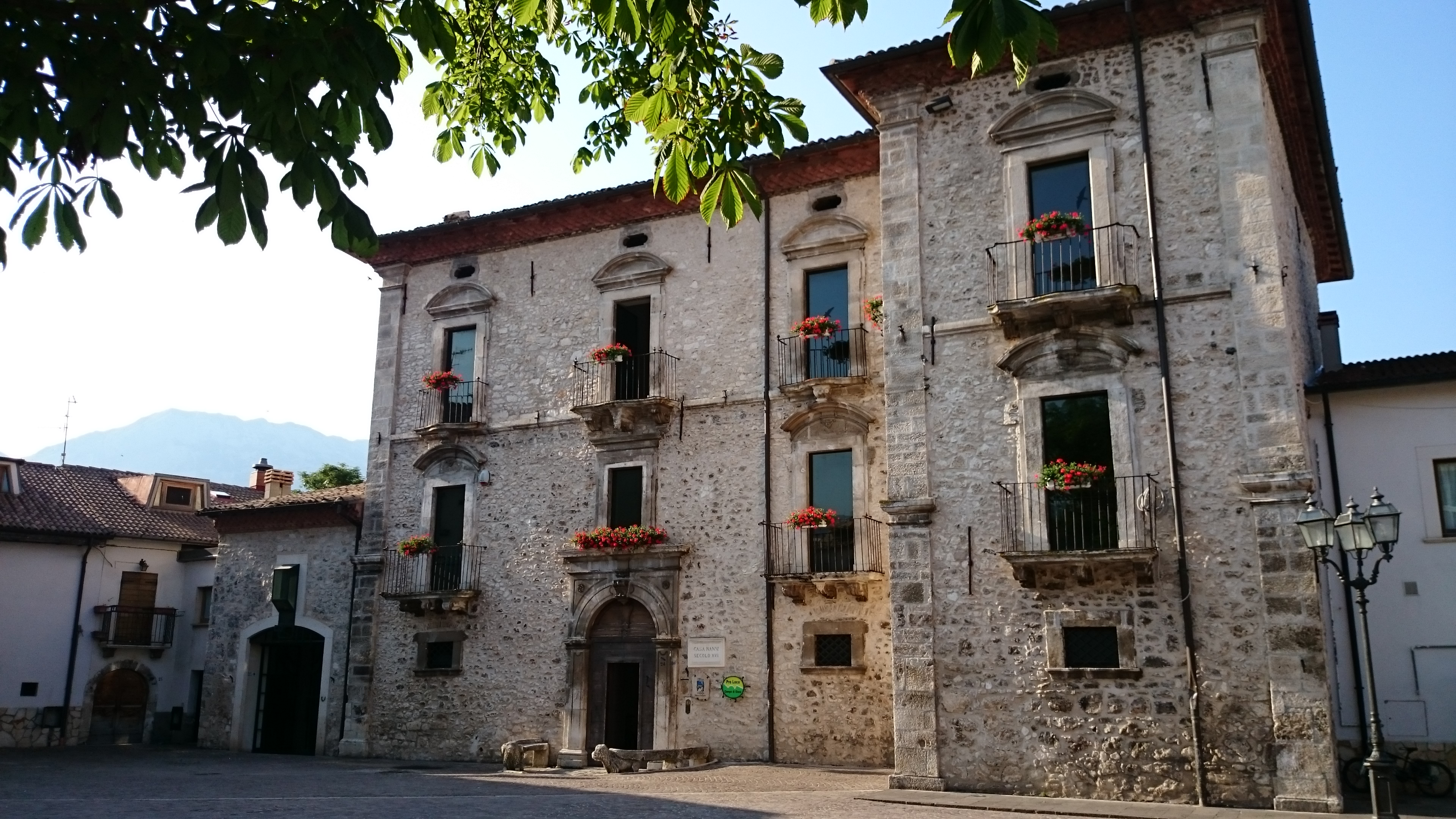 Palazzo Nanni (XVII - XVIII sec.) in piazza Duval